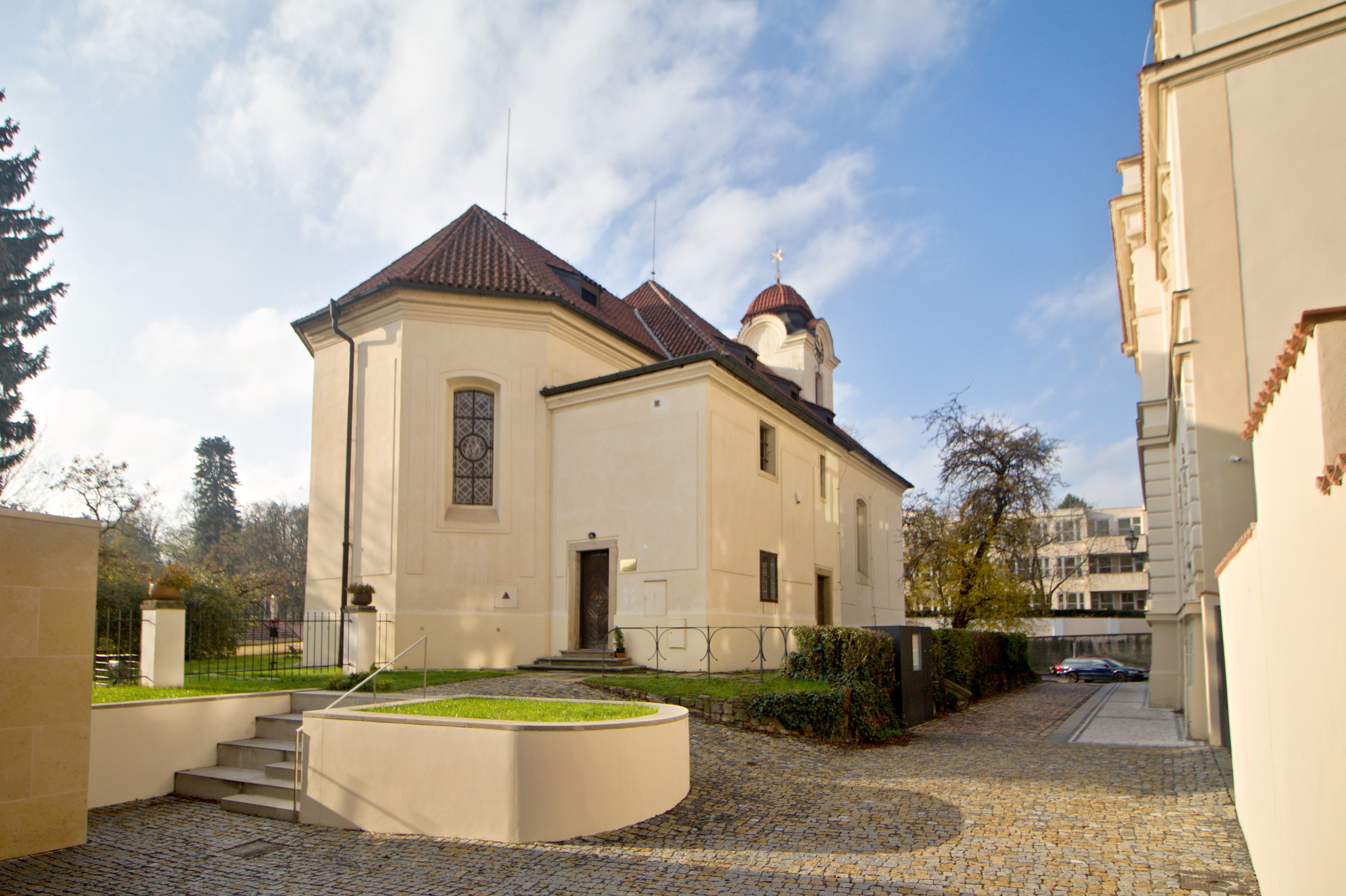 Praha 6-Bubeneč kostel sv. Gottharda